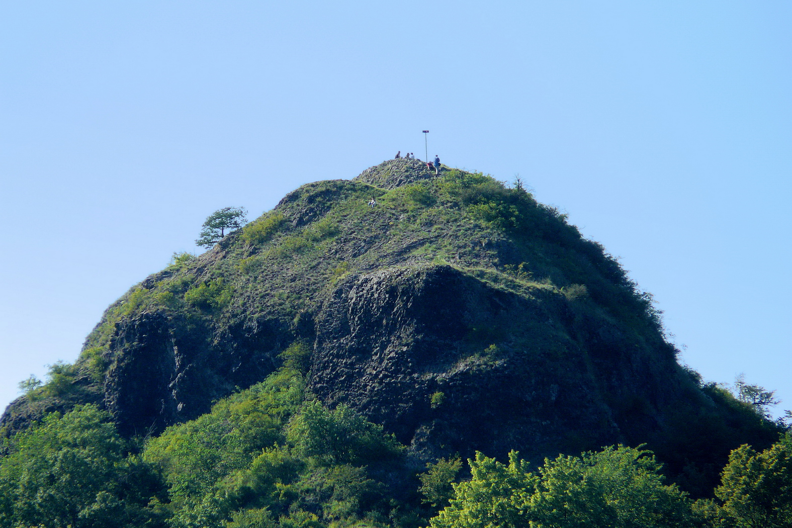 Lysá skála z úpatí Dlouhého vrchu